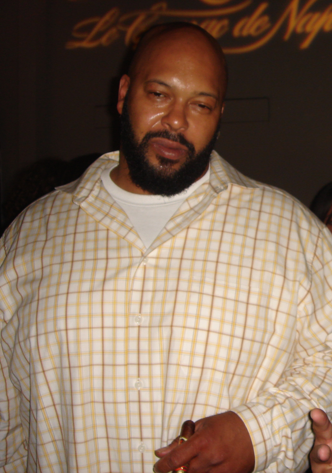 Nick Leisure & Suge Knight